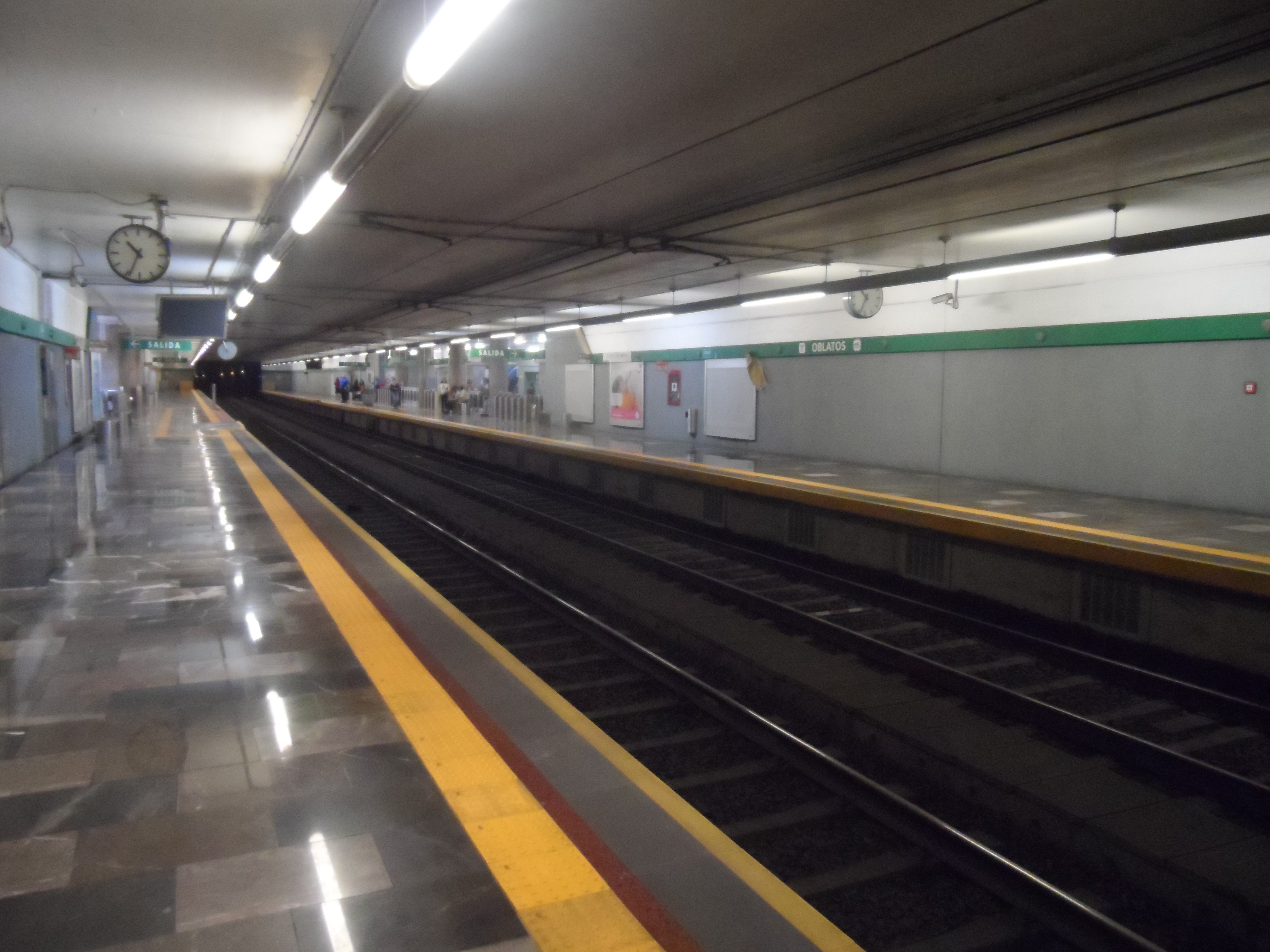 Andenes de la estación Oblatos de la Línea 2 del Tren Ligero de Guadalajara.